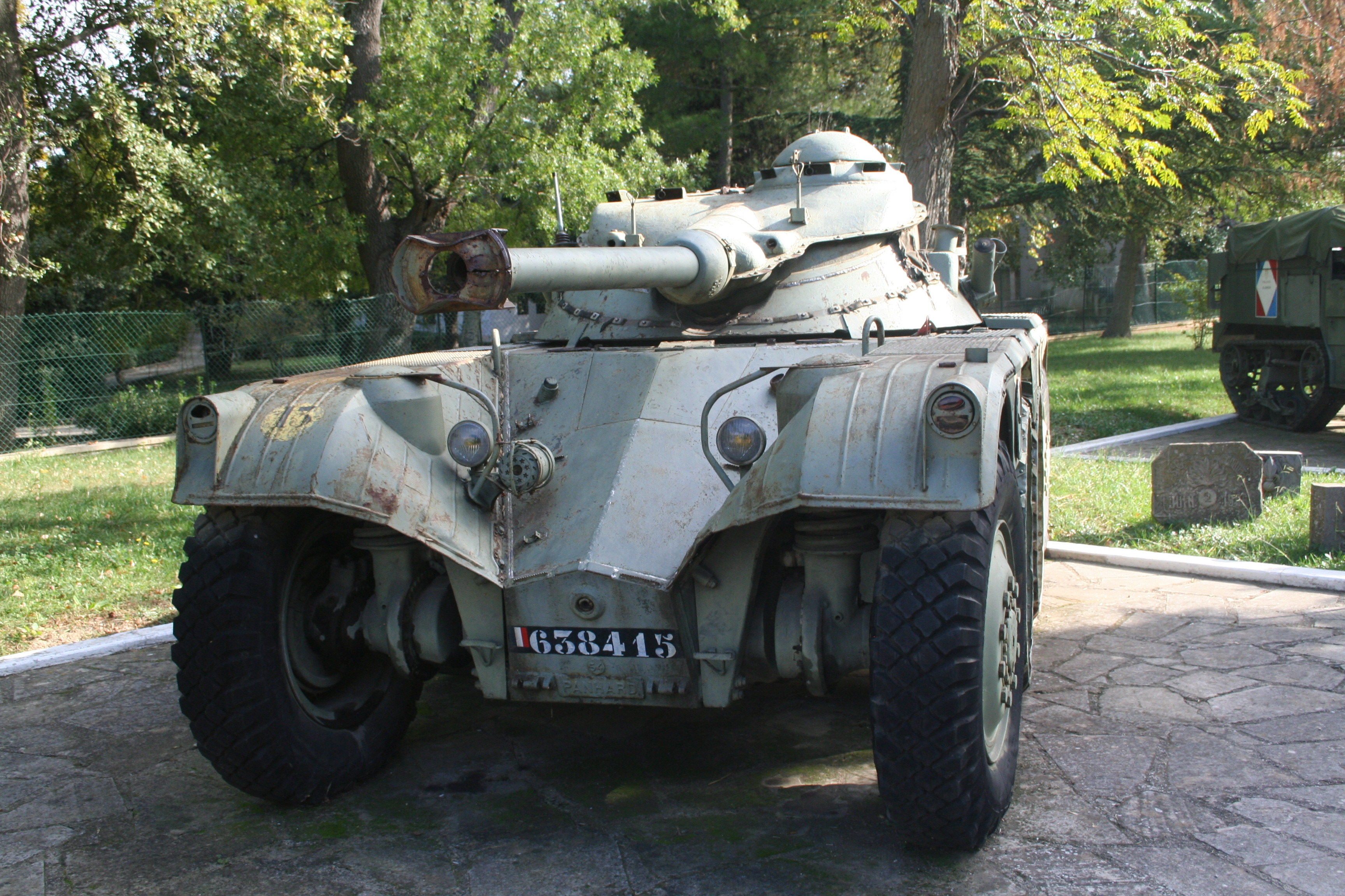 Engin blindé Panhard EBR 75 à roues vu de face